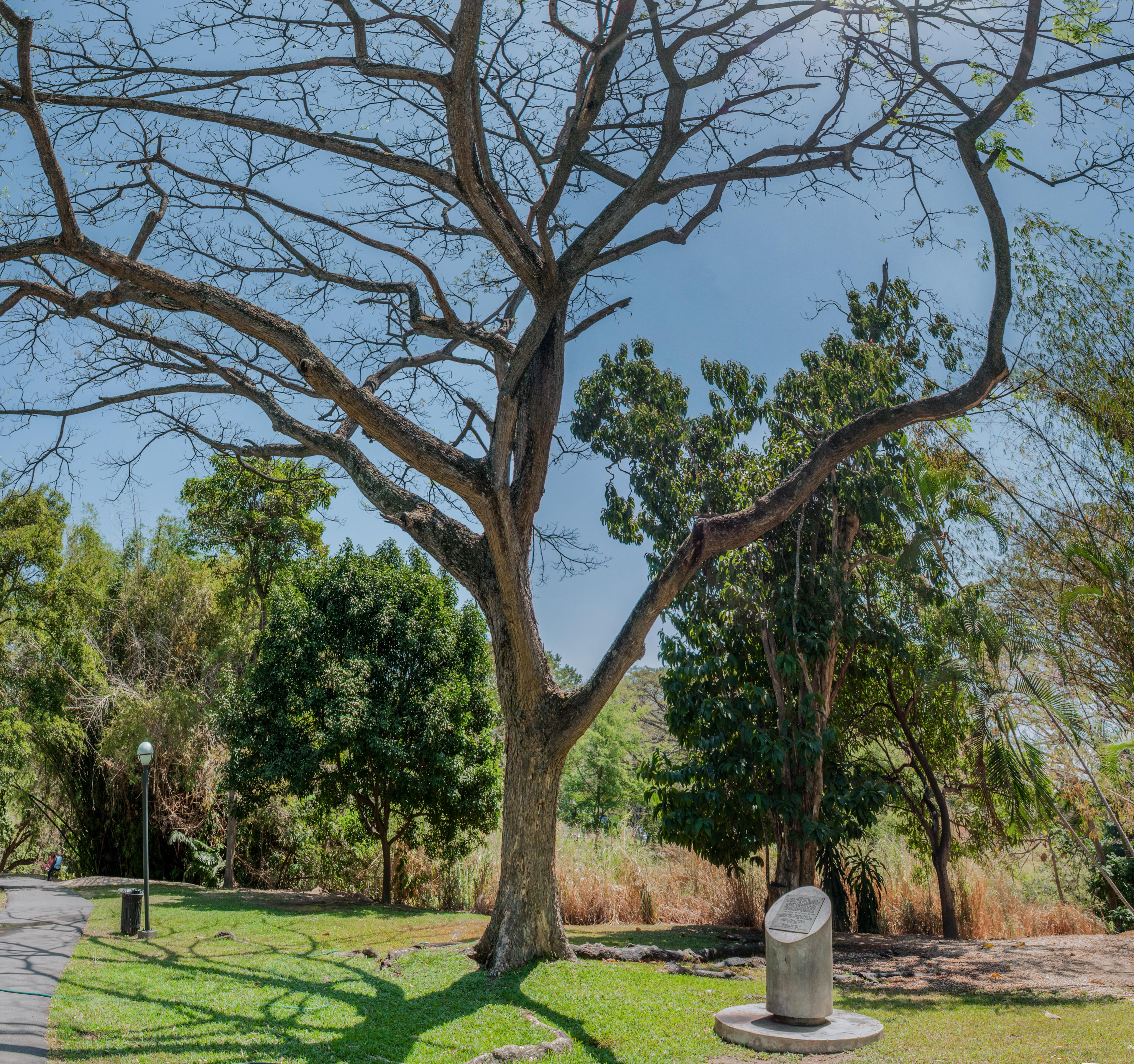 Nieto Saman de Guere